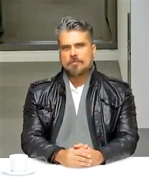 Live com Villela da Matta e Frederico Lapenda Acompanhe a live com Frederico Lapenda, produtor de cinema e cliente de Villela da Matta, que saiu do Brasil ainda muito jovem e construiu uma carreira de sucesso no MMA e em Hollywood, que o levou a trabalhar com astros, como Nicolas Cage, John Travolta, Danny Glover, Pamela Anderson, Stan Lee, dentre outros. Saiba o que ele fez para superar os seus desafios, lidar com suas crenças e alcançar de forma mais rápida seus objetivos. Coaching #SBCoaching